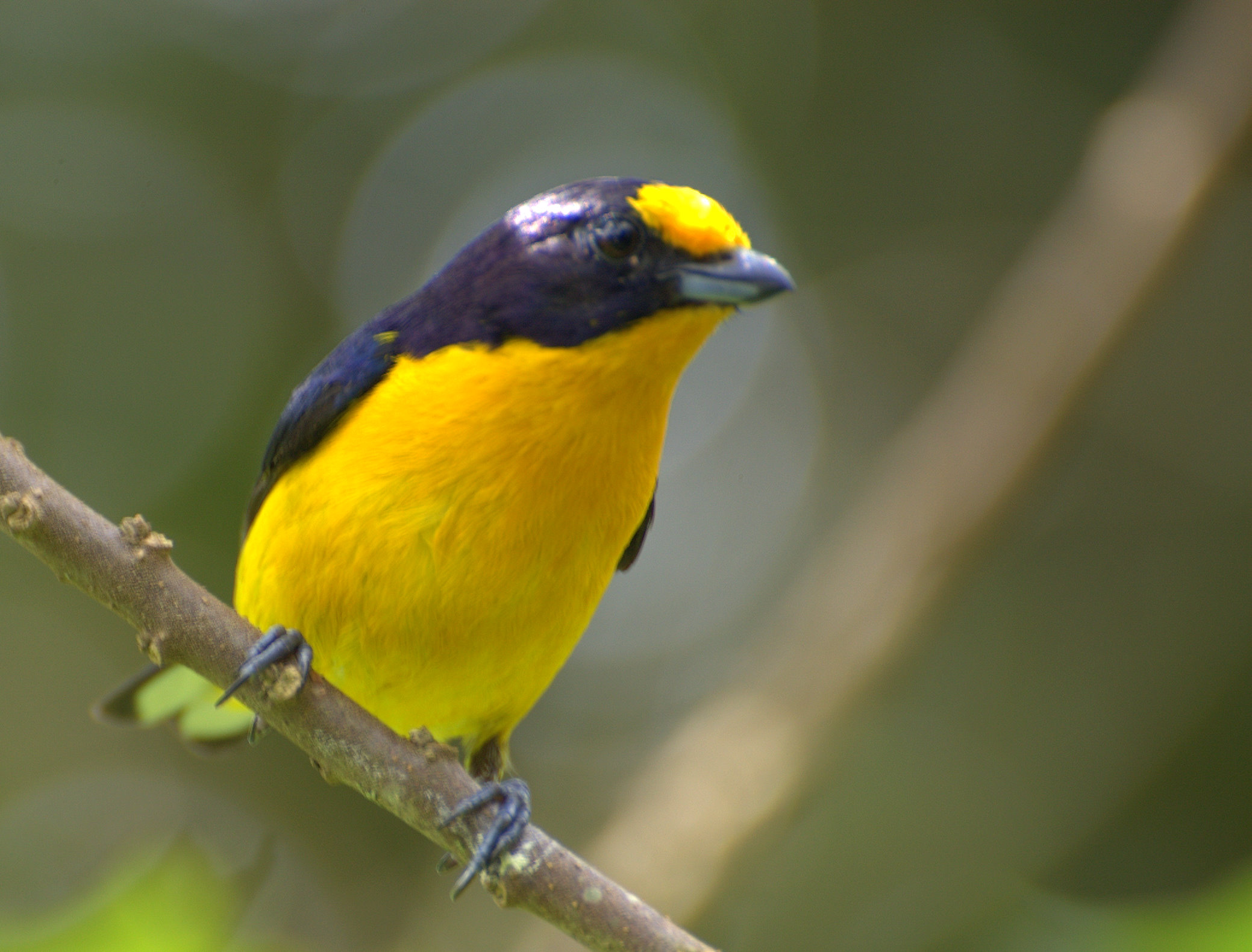 Euphonia violacea No quintal da casa da minha sogra na cidade de Registro-SP